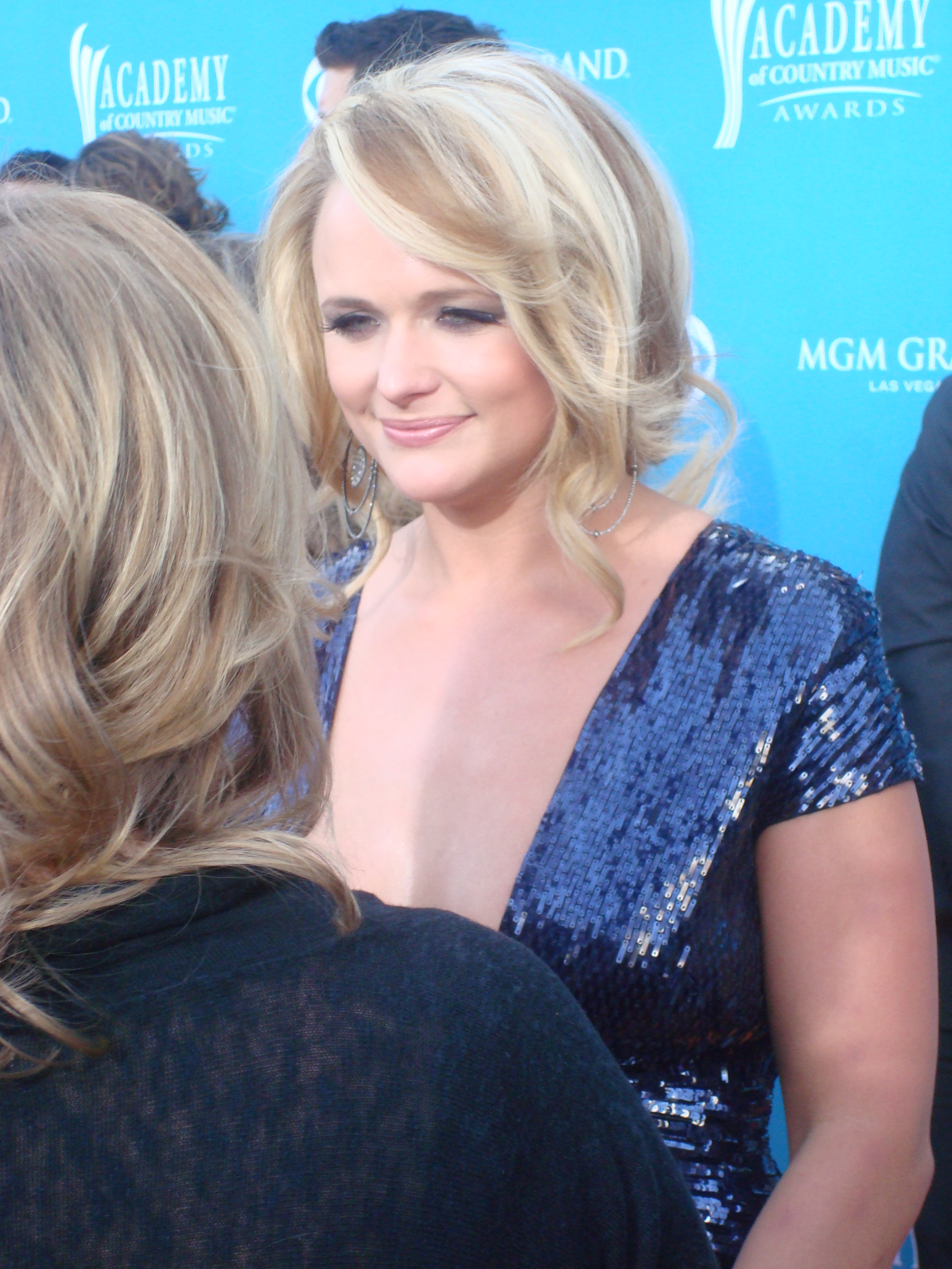 Miranda Lambert